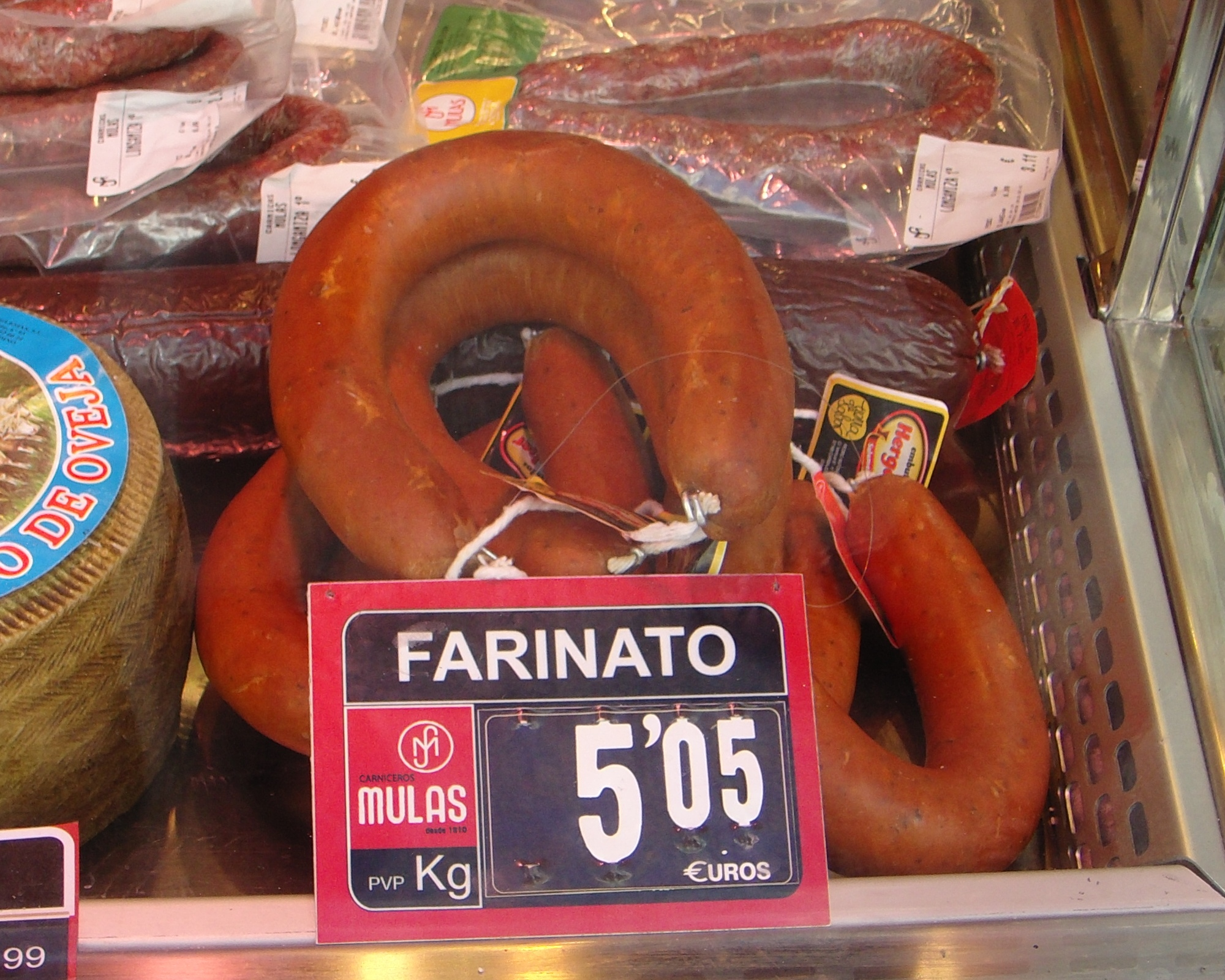 Farinato a la venta en Salamanca